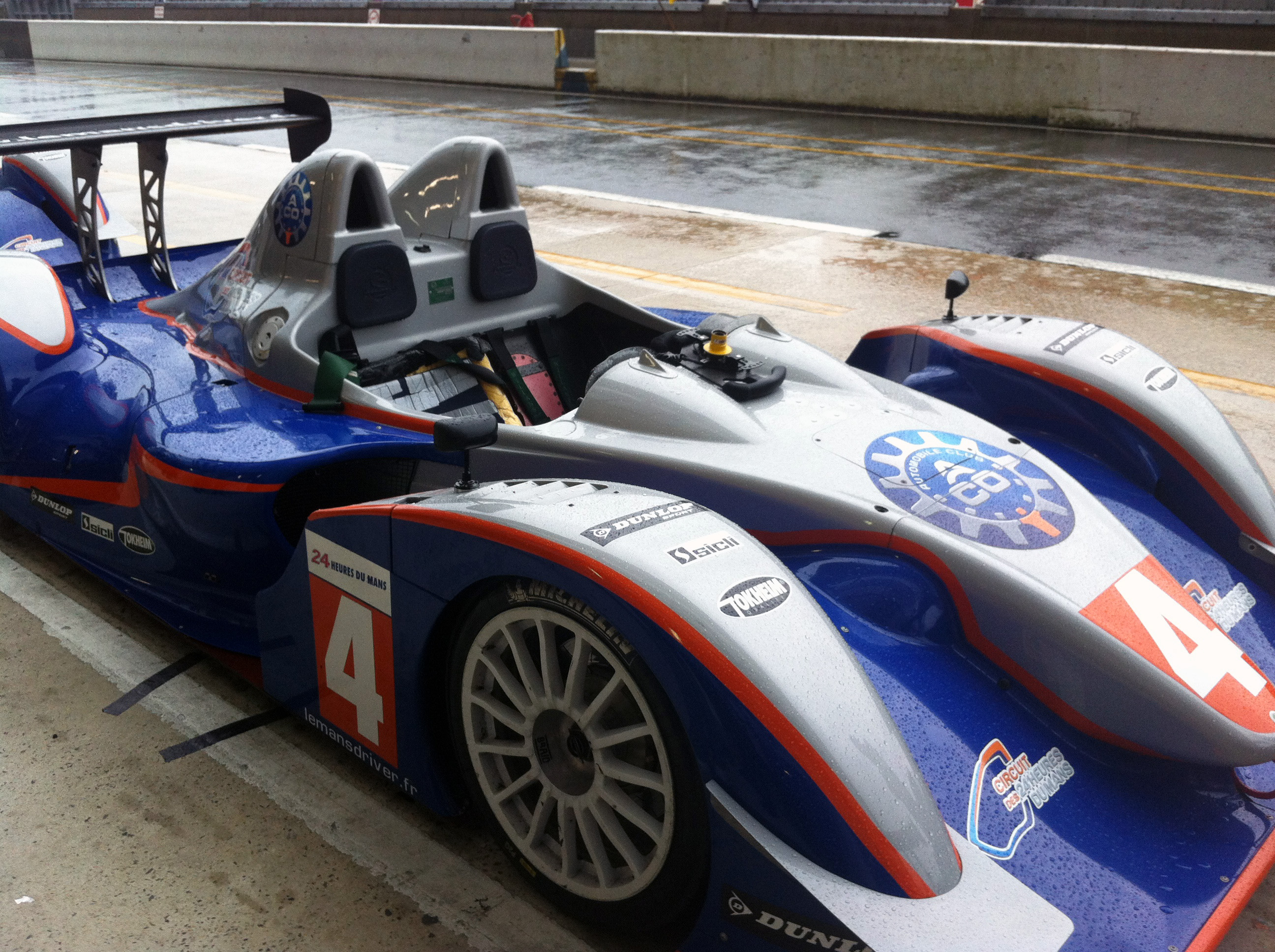 Prototype Pescarolo aux couleurs de l'Automobile Club de l'Ouest et utilisé pour l'école de pilotage sur le Circuit Bugatti du Mans.